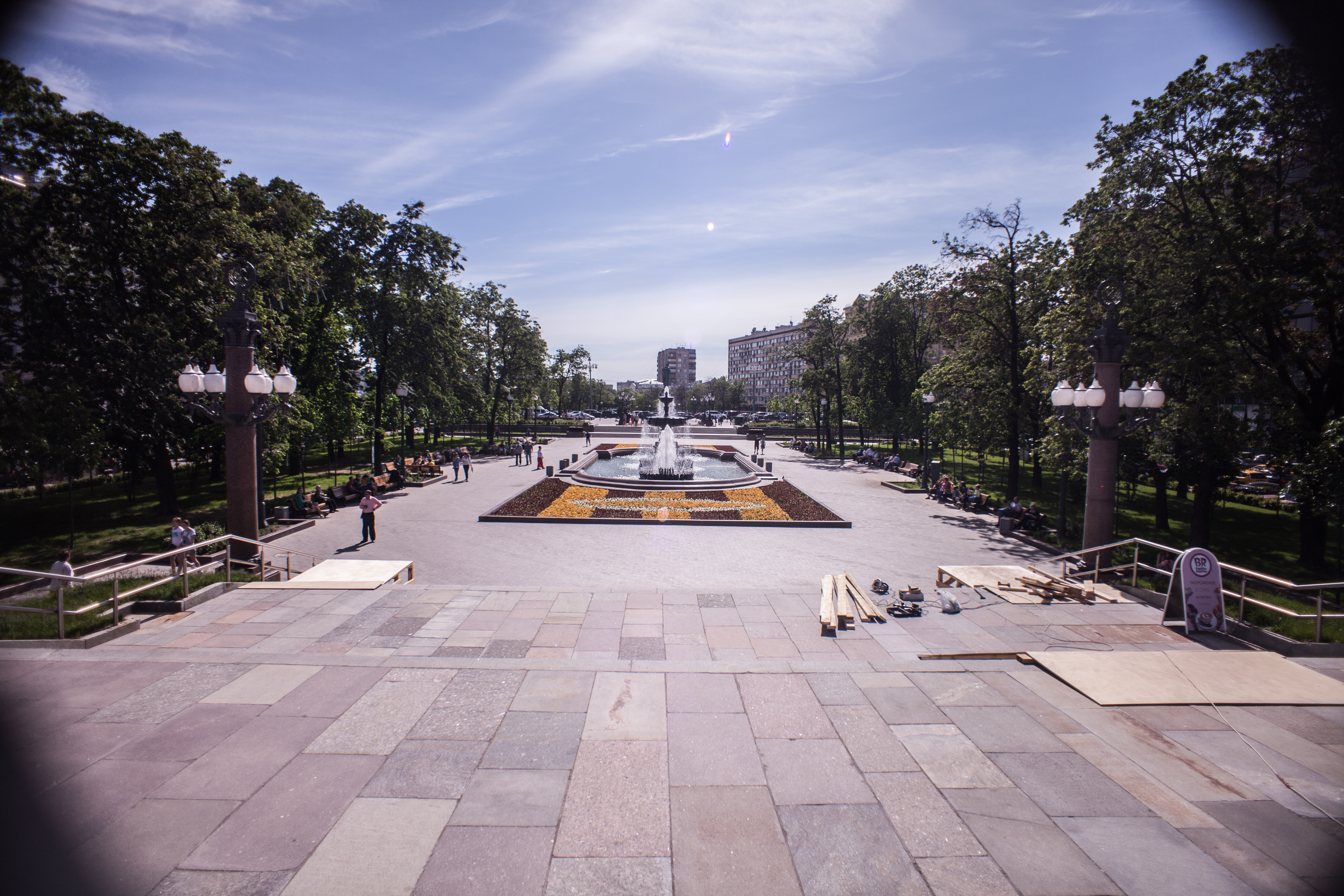 Пушкинская площадь (вид от кинотеатра "Россия")